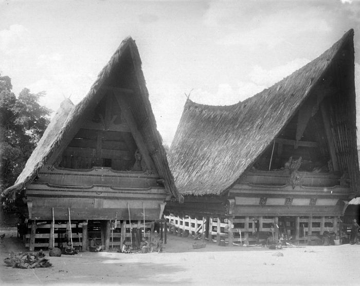 Negatief. In deze scène van een Toba-Batak dorpsplein zijn de vrouwen met de weefkunst bezig. Zij zitten zoals gewoonlijk op het plein, voor het huis, in de schaduw van het dak. De kinderen blijven dicht bij de moeder. Voor het linkerhuis staan twee opgestelde toestellen met geverfde garen. Alhoewel niet heel duidelijk zichtbaar, zijn de vrouwen waarschijnlijk bezig de garens te stijven met rijstepap. De kinderen zitten eromheen en helpen misschien met het opwinden van garens aan de weefspoel. De kinderen zijn informeel in de leer. Geleidelijk nemen zij taken over. Een mand wordt gevlochten voor de trap bij de ingang van het huis. Voor het rechterhuis vinden andere bezigheden plaats. Er wordt aan twee weefgetouwen geweven en een ketting wordt gespannen. . Batakhuizen uit de omgeving van het Tobameer